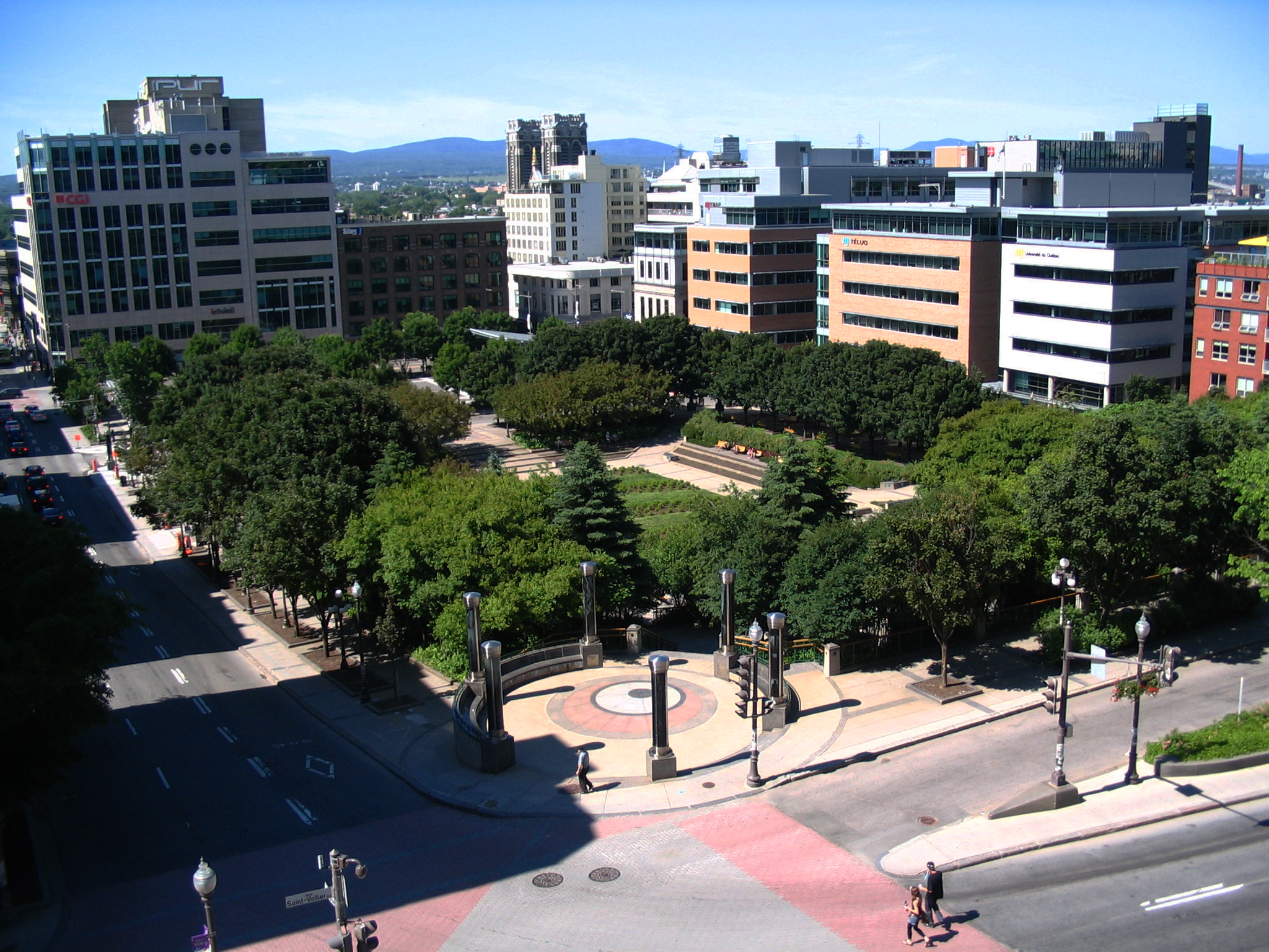 Coin Saint-Vallier et Dorchester et les Jardins Saint-Roch à Québec, vus de l'escalier du Faubourg.